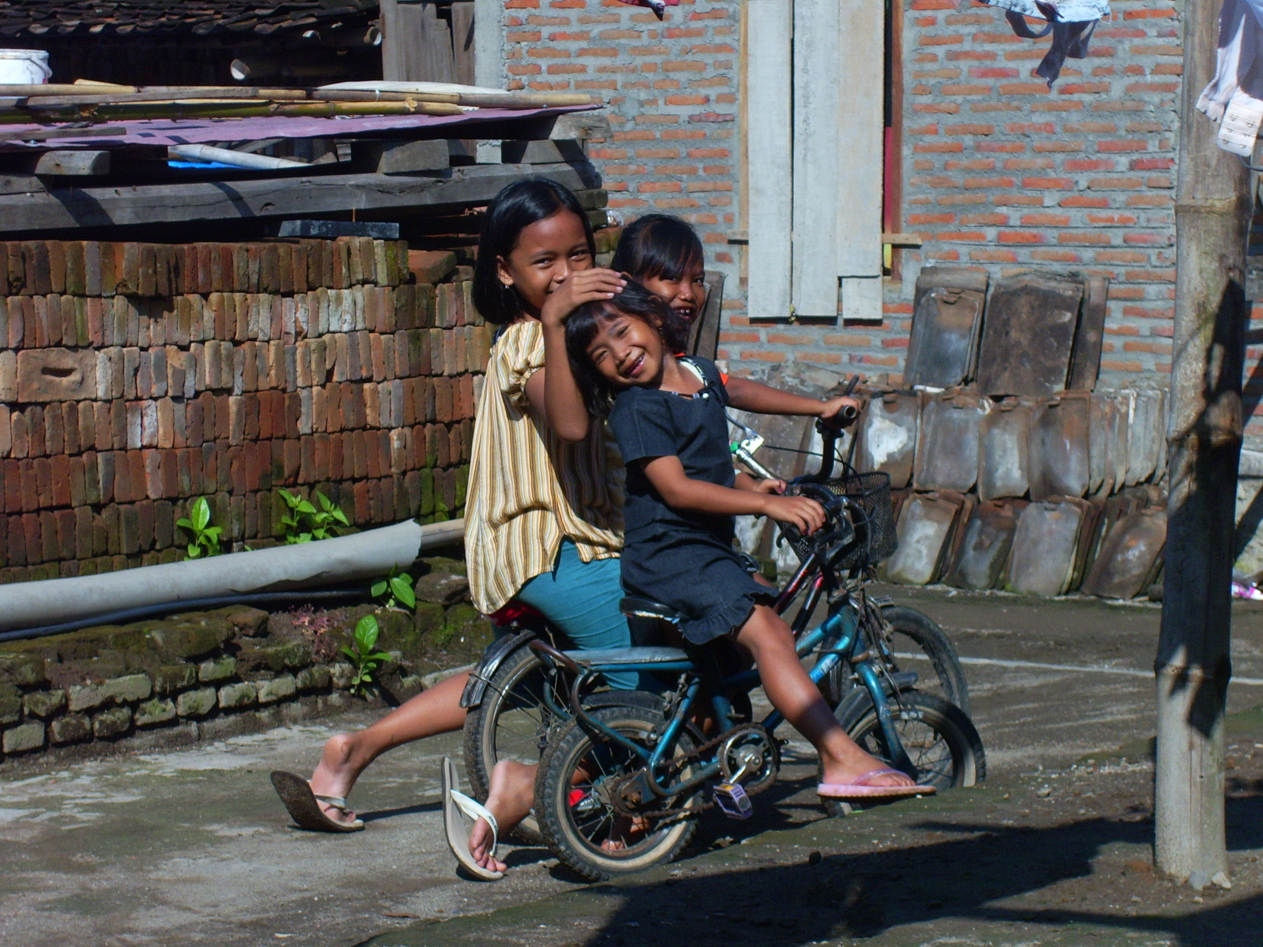 3 anak perempuan asal Bantul sedang berpose sambil menaiki sepeda